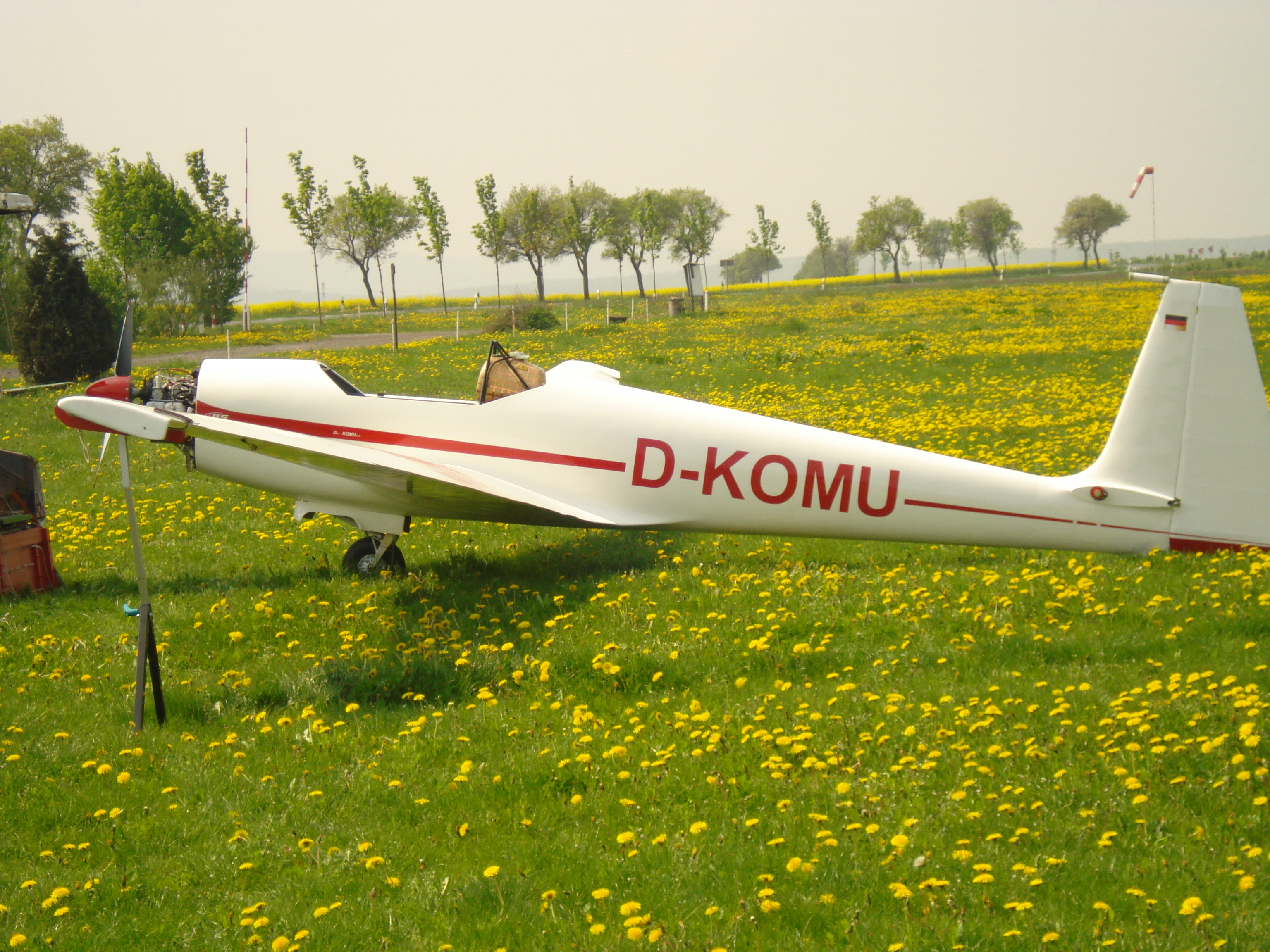 ASK 14 fast fertig aufgerüstet auf dem Flugplatz Günterode/Heiligenstadt